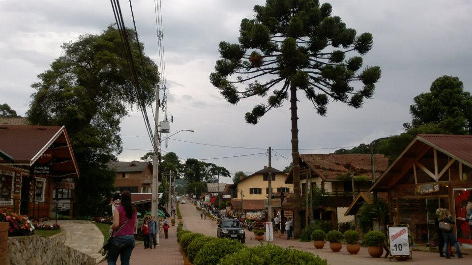 Araucária em Monte Verde, a Localidade mais Alta e Meridional de Minas Gerais com 1555,5 metros de Altitude na Av. Principal da Vila